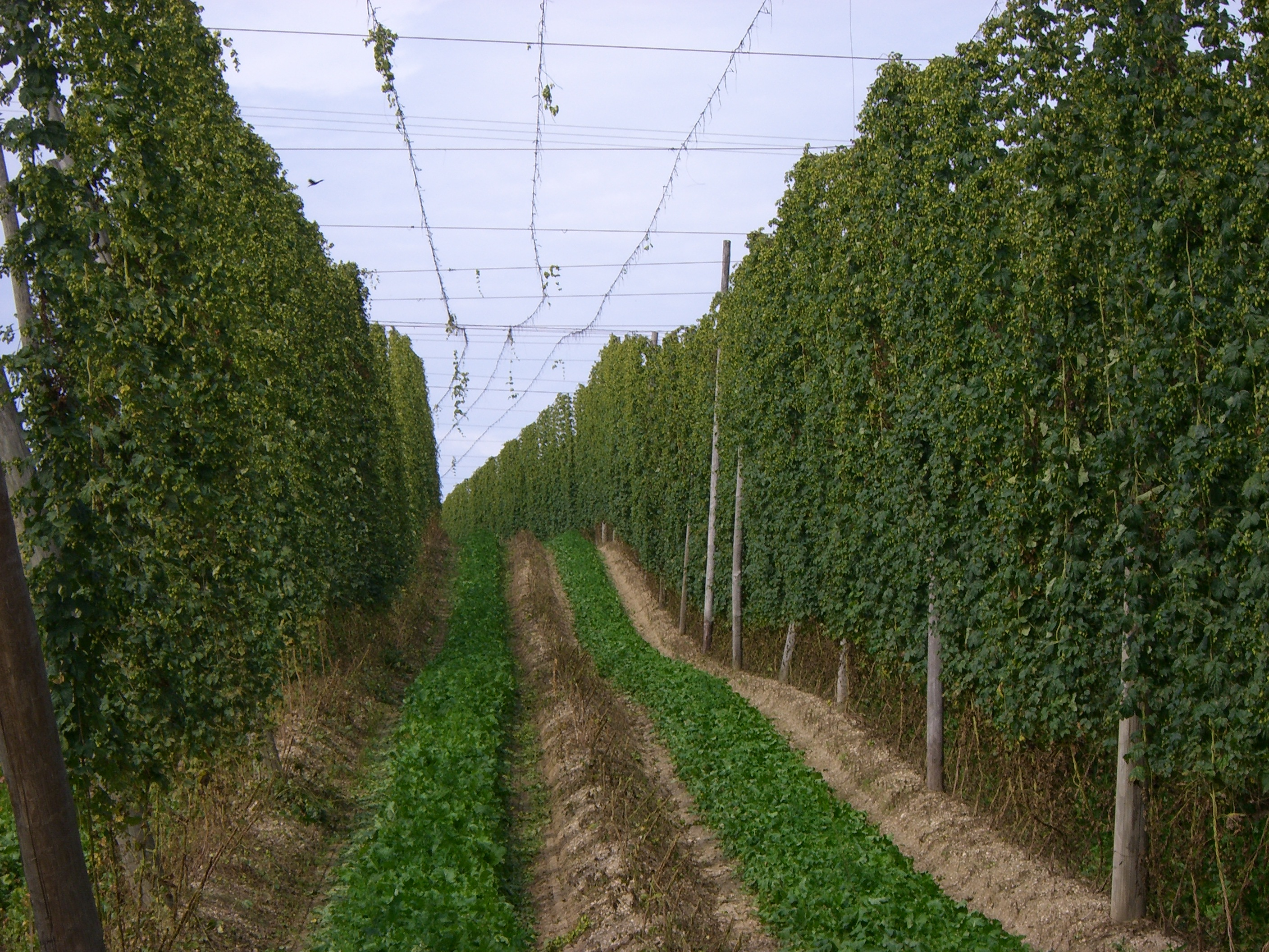 Hopfengarten in der Hallertau während der Erntezeit (Gemeinde Au/Hallertau, Landkreis Freising, Bayern, Deutschland)